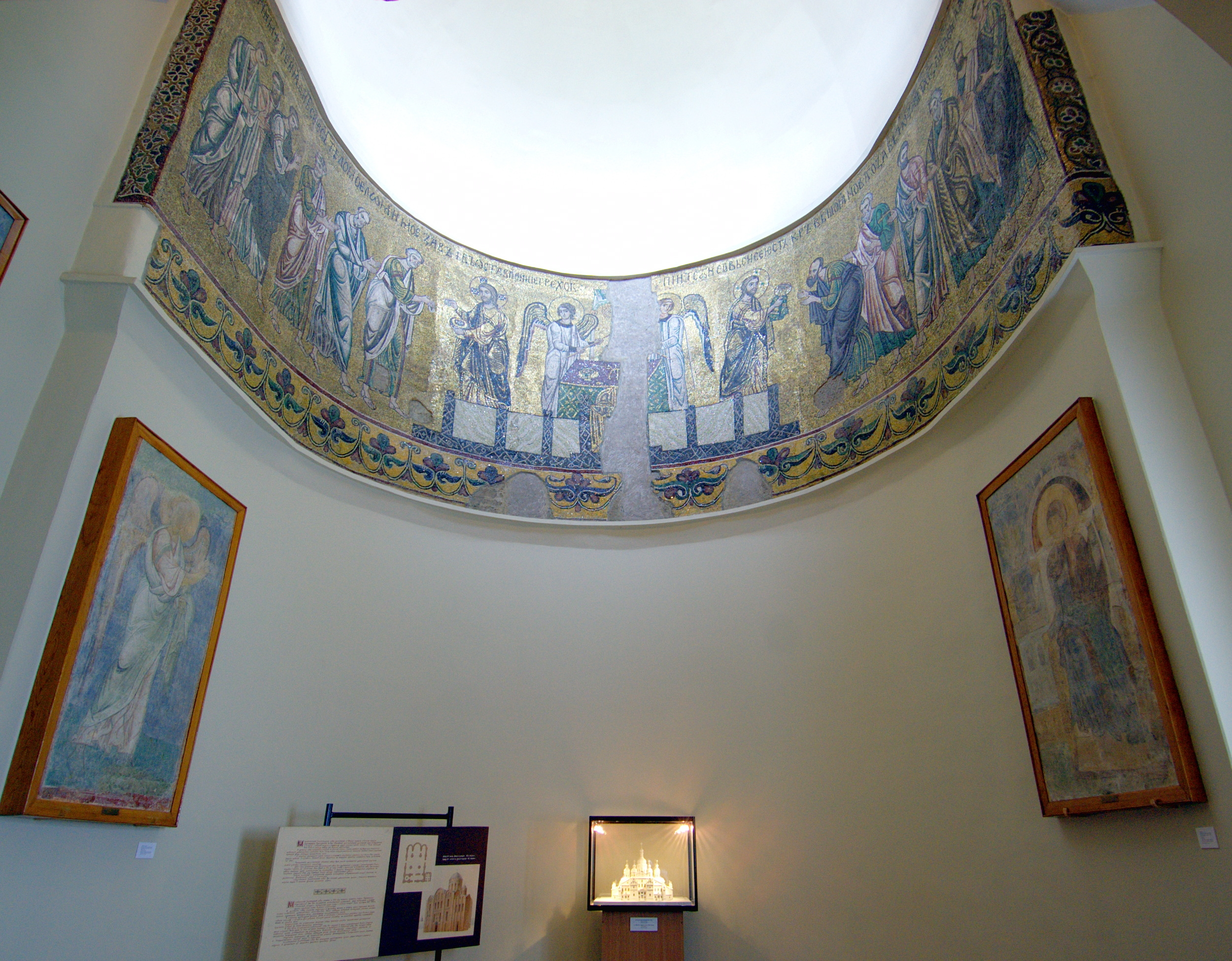 Немного прошлогодних фотографий. Мозаика "Святая Евхаристия". Это одна из оригинальных мозаик Златоверхого Михайловского монастыря, хранящихся в Софийском соборе Киева. Все, что удалось спасти перед сносом Михайловского собора, оказалось в трех городах Союза: Москве, Ленинграде и Киеве.